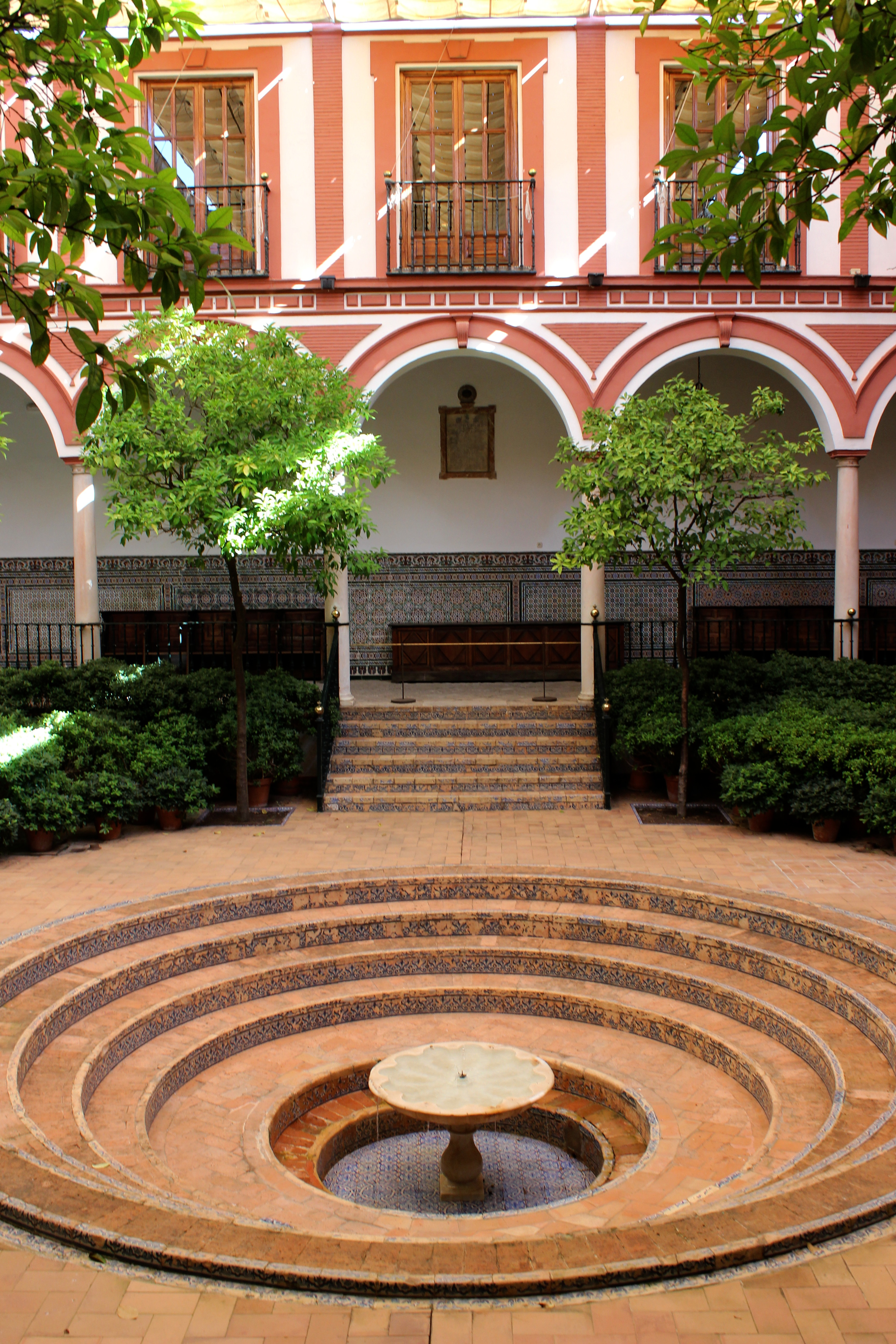 Sevilla. Hospital de los Venerables. Claustro.